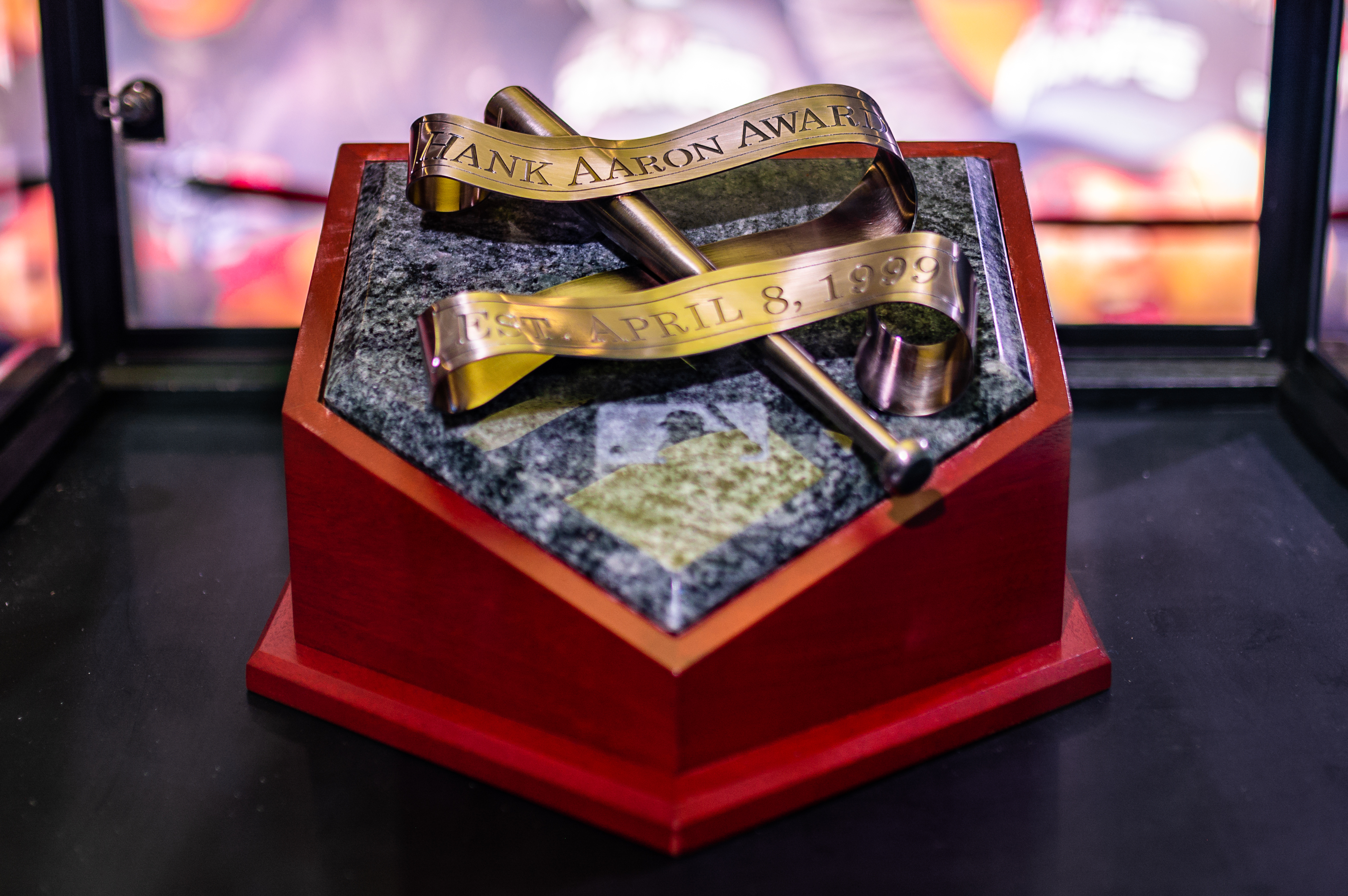 Play Ball Ballpark